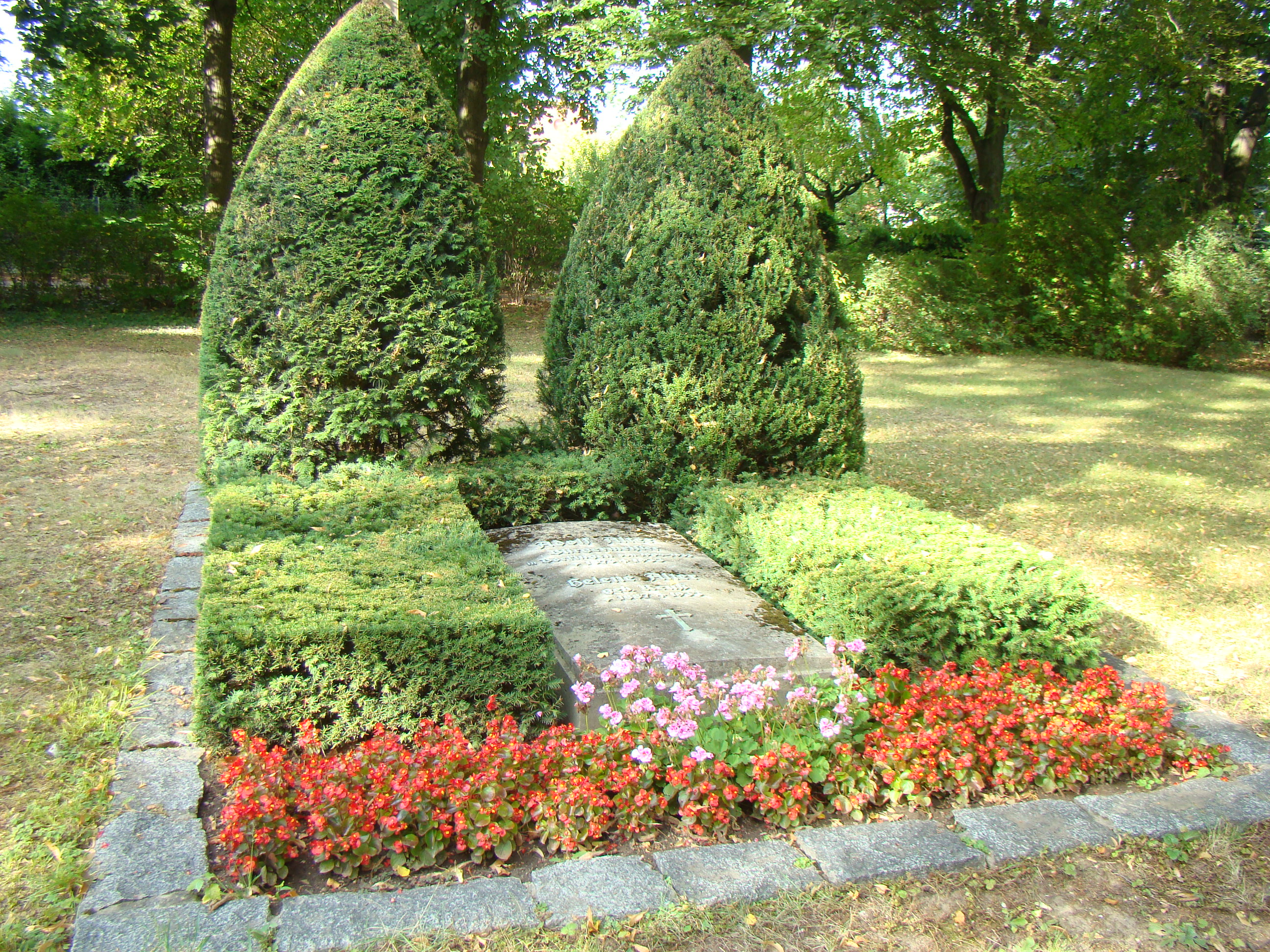 Grabstätte von Adolf Alter auf dem Friedhof in Heilbronn-Böckingen